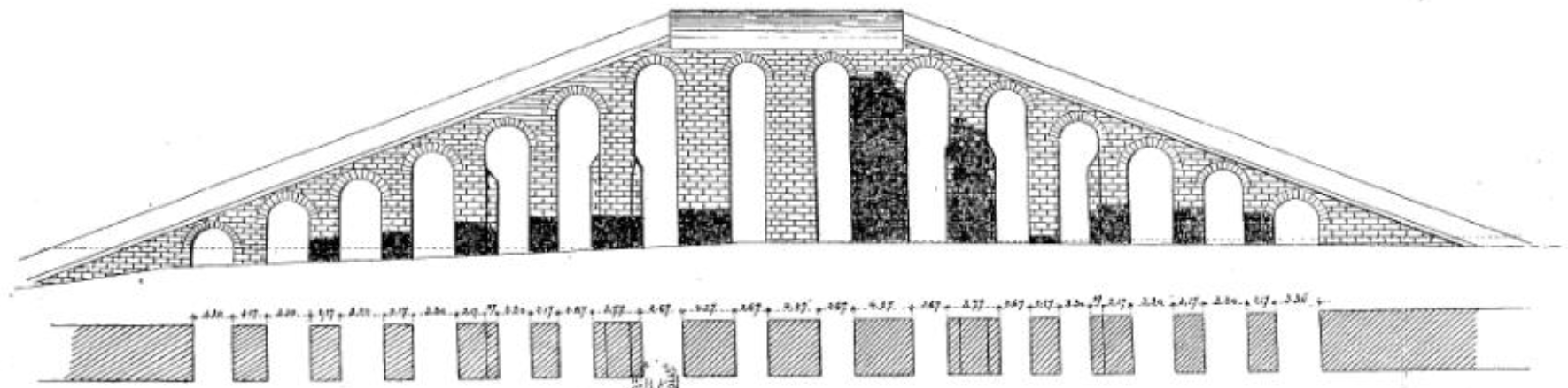 Reconstitution du réservoir de l'aqueduc de Craponne (dont subsistent aujourd'hui les tourillons de Craponne) par. M. Germain de Montauzan.